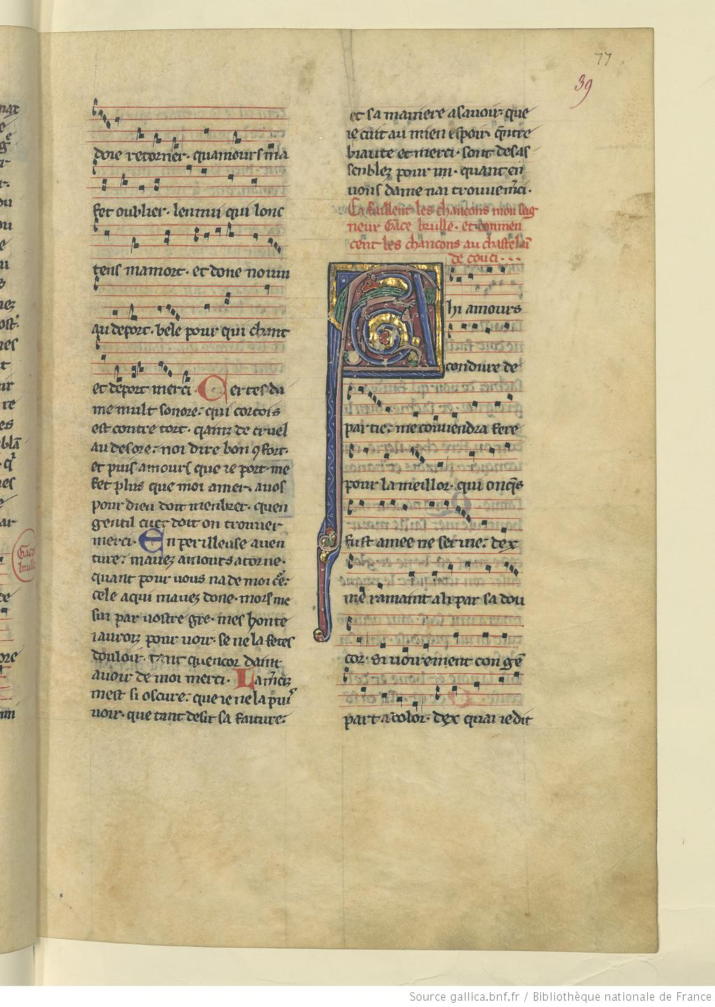 « Les chansons au CHASTELAIN DE COUCI » dans - Date d'édition : 1201-1300 , Bibliothèque nationale de France, Département des manuscrits, Français 845